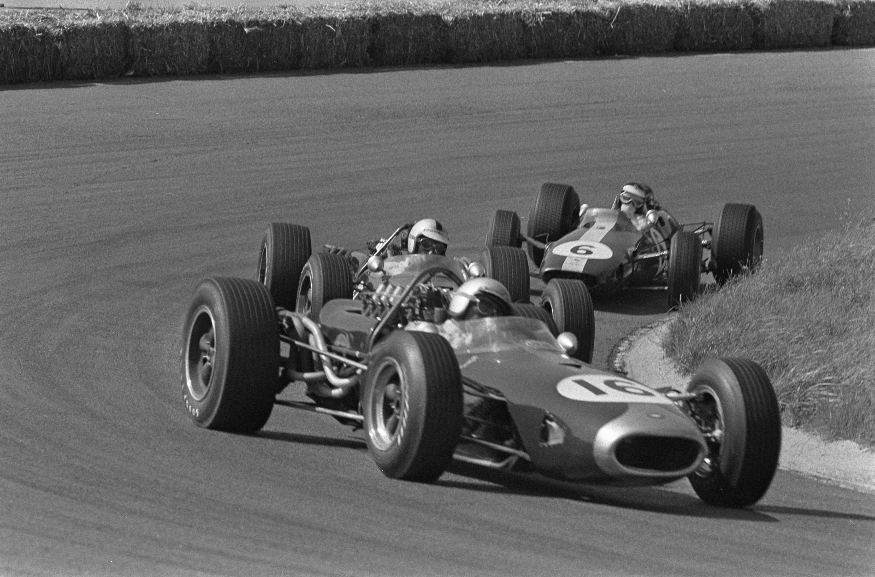 Collectie / Archief : Fotocollectie Anefo Reportage / Serie : [ onbekend ] Beschrijving : Grand Prix te Zandvoort, wagens tijdens de race. Jack Brabham (16) aan de leiding, gevolgd door Denny Hulme (18) en Jim Clark (6) Datum : 24 juli 1966 Locatie : Noord-Holland, Zandvoort Trefwoorden : autosport, sport Persoonsnaam : Brabham, Jack, Clark, Jim, Hulme, Denny Fotograaf : Koch, Eric / Anefo Auteursrechthebbende : Nationaal Archief Materiaalsoort : Negatief (zwart/wit) Nummer archiefinventaris : bekijk toegang 2.24.01.05 Bestanddeelnummer : 919-3865